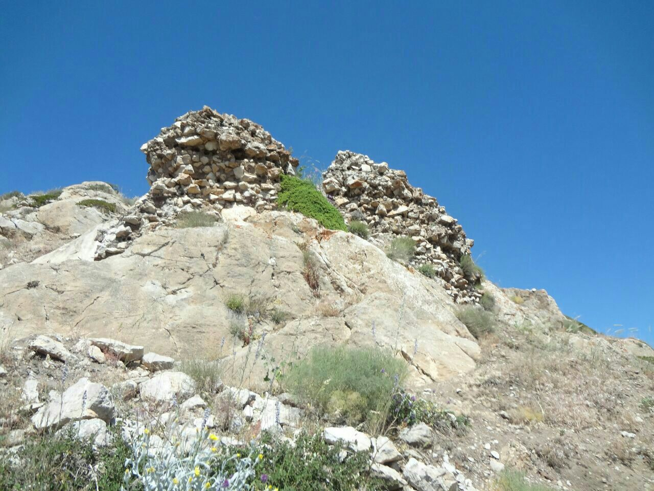 برج دیدبانی